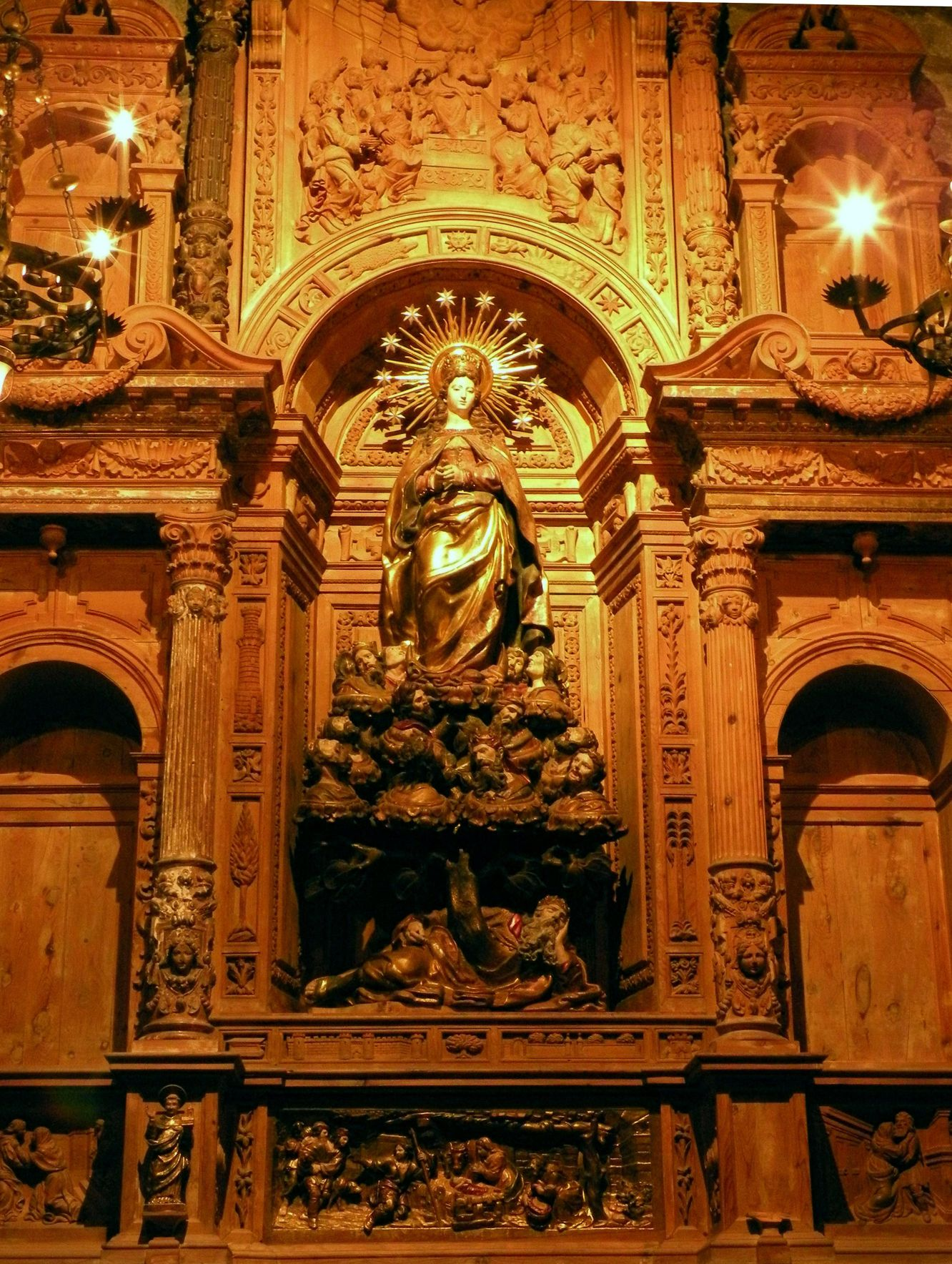 Retaule amb la Puríssima de l'Església de Sta Maria de Verdú.